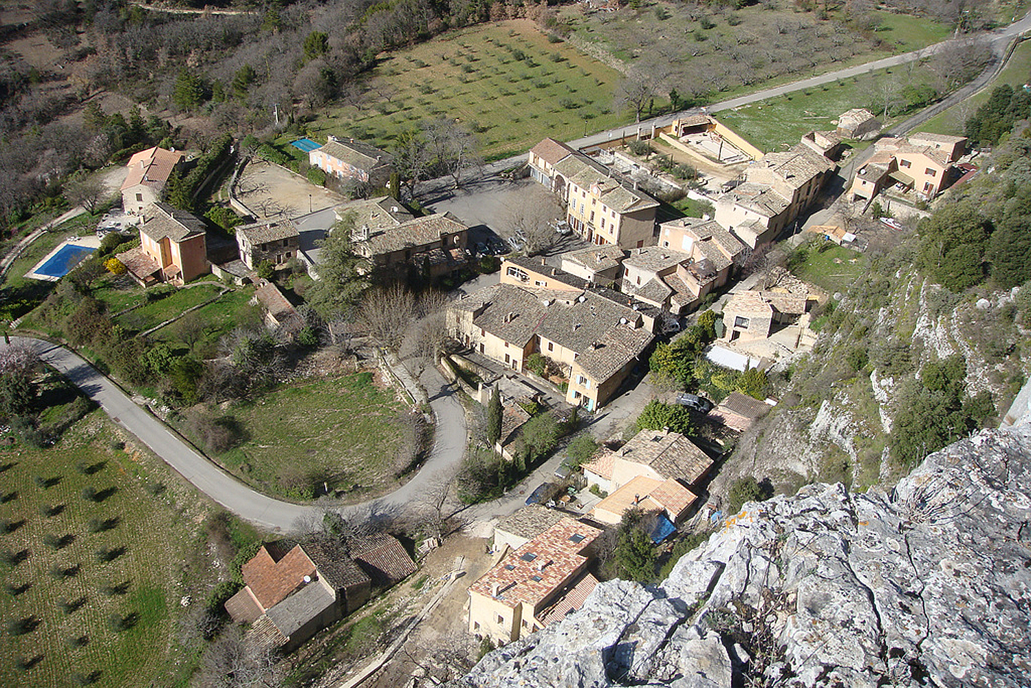 Lioux, village descendu dans la plaine